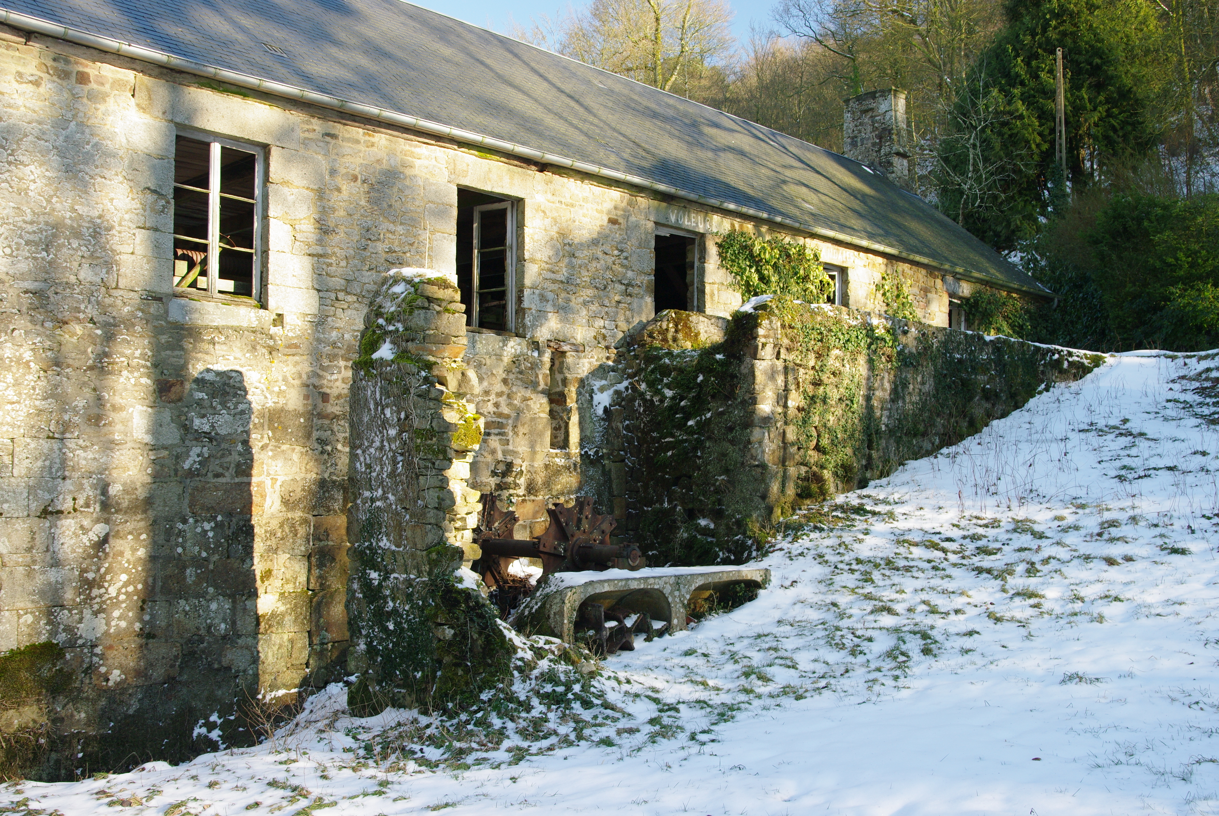 La filature de laine à Rochefort; Tinchebray 61